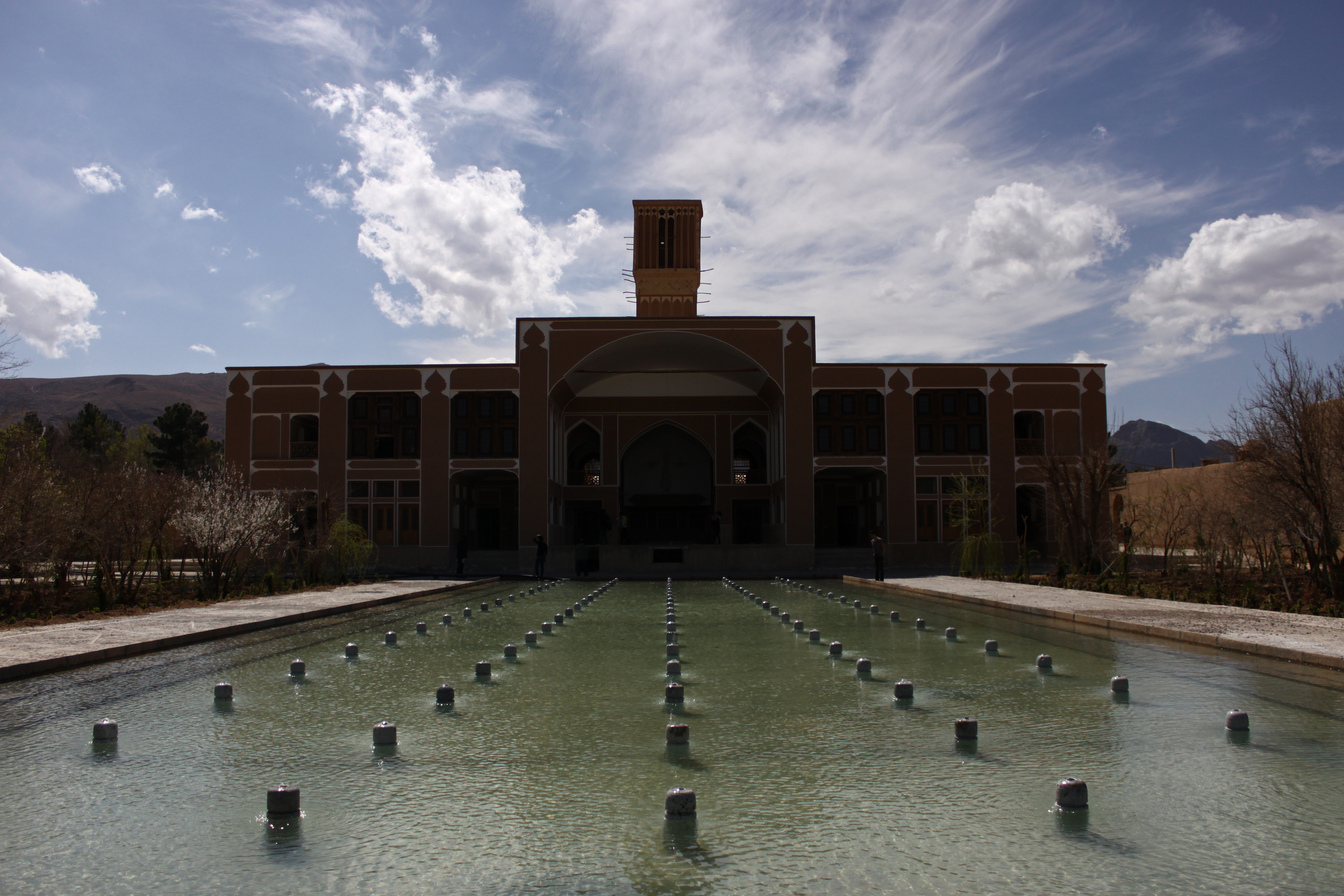 باغ و ساختمان نمیر صدری (نمیر زرتشتی) در شهرستان تفت استان یزد